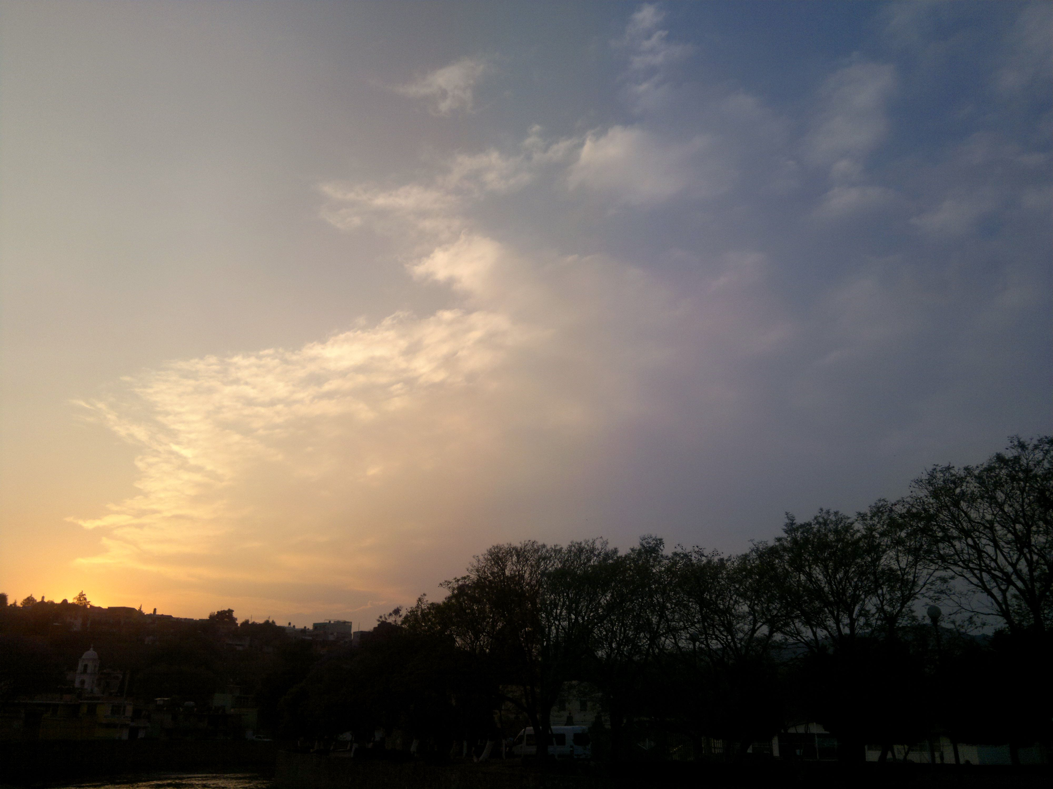 atardecer